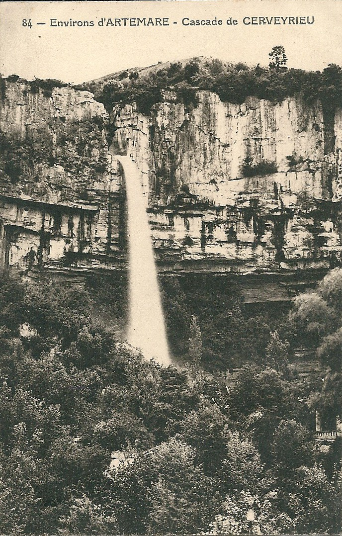 Artemare - Cascade de Cerveyrieu - avant 1929 (date d'envoi postal de la carte)